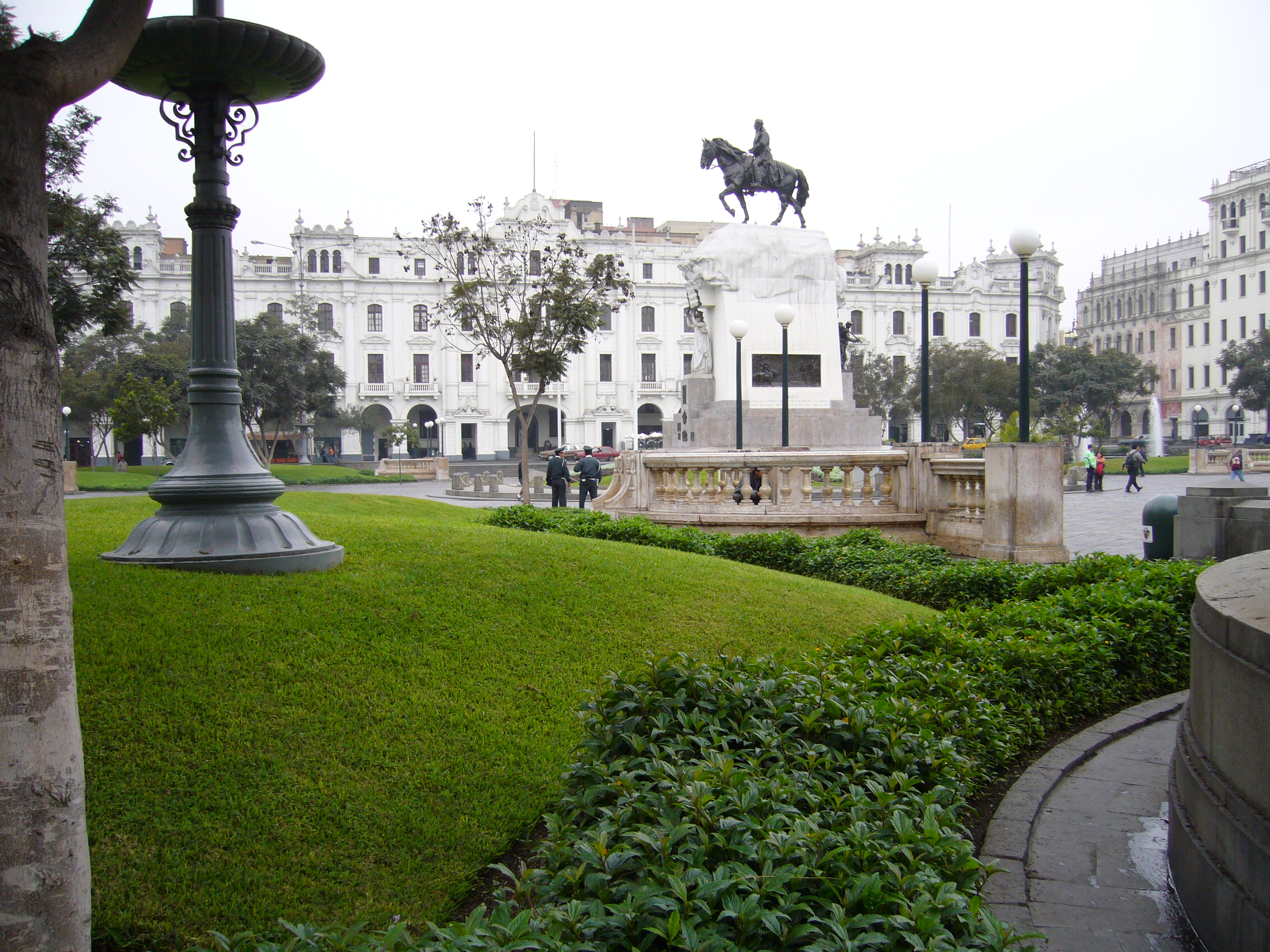 Descripción: Plaza de San Martín Lugar: Centro Histórico de Lima Distrito : Cercado de Lima Ciudad : Lima País : Perú Fotógrafo: © Manuel González Olaechea y Franco Fecha de la foto : 11 de julio de 2007